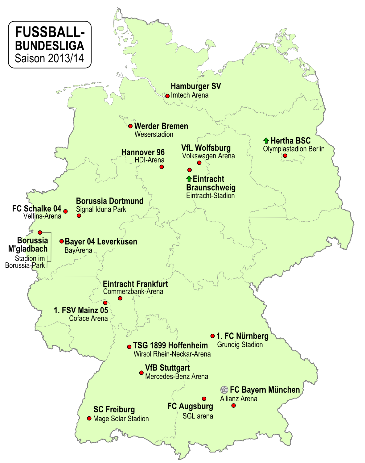 Karte der Vereine der Fußball-Bundesliga-Saison 2013/2014